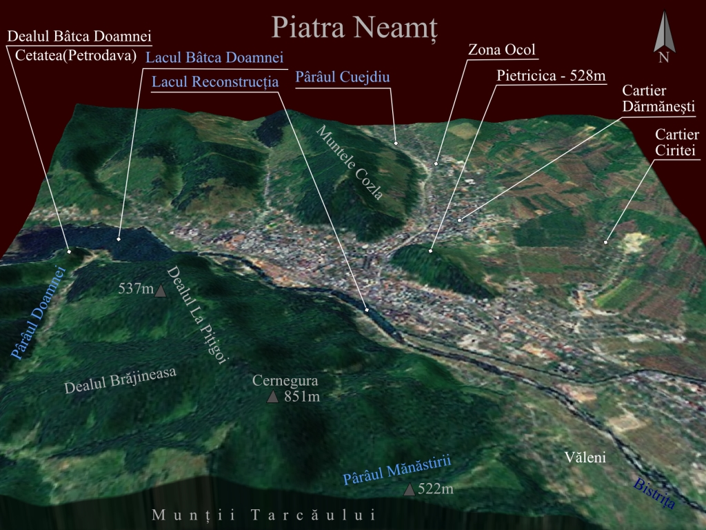 Harta 3D pentru Piatra Neamt, Romania.